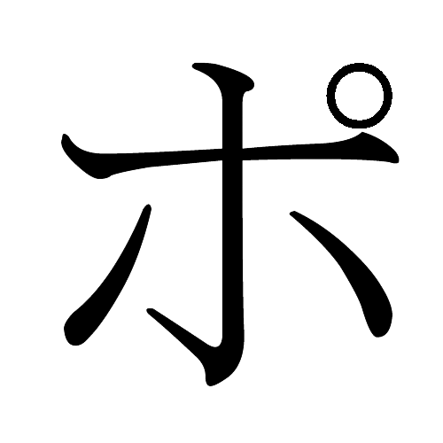 Japanese Katakana "Po"